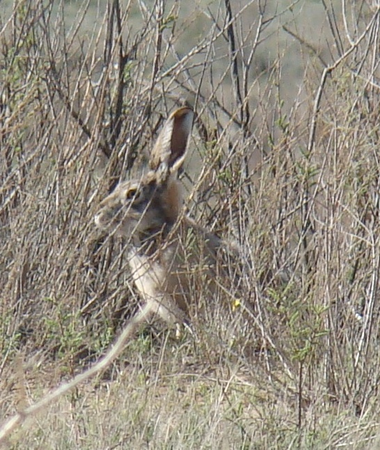 Заяц-толай (Lepus tolai). Окрестности города Байконур, Казахстан.